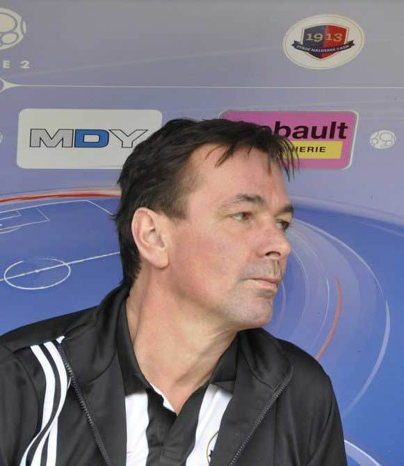 Stéphane Paille lors du centenaire du Stade Malherbe Caen le 13 octobre 2013